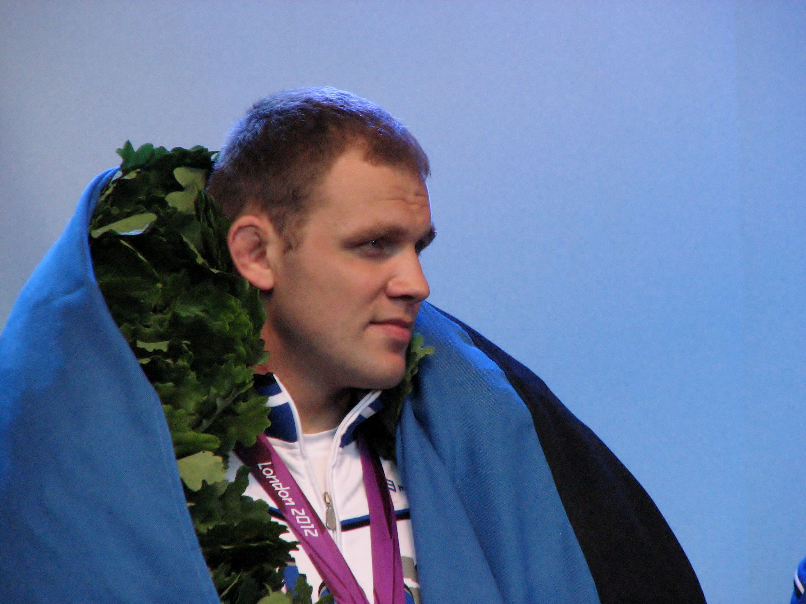 Heiki Nabi Londoni olümpiamängude järel Vabaduse väljakul olümpiamedalistide tervituspeol